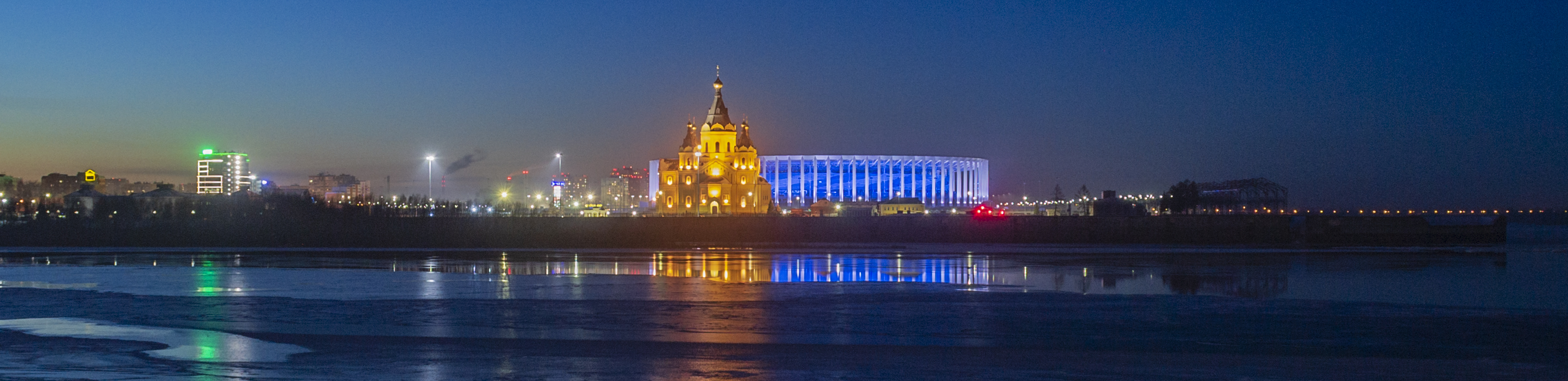 Панорама Стрелки Оки и Волги в Нижнем Новгороде